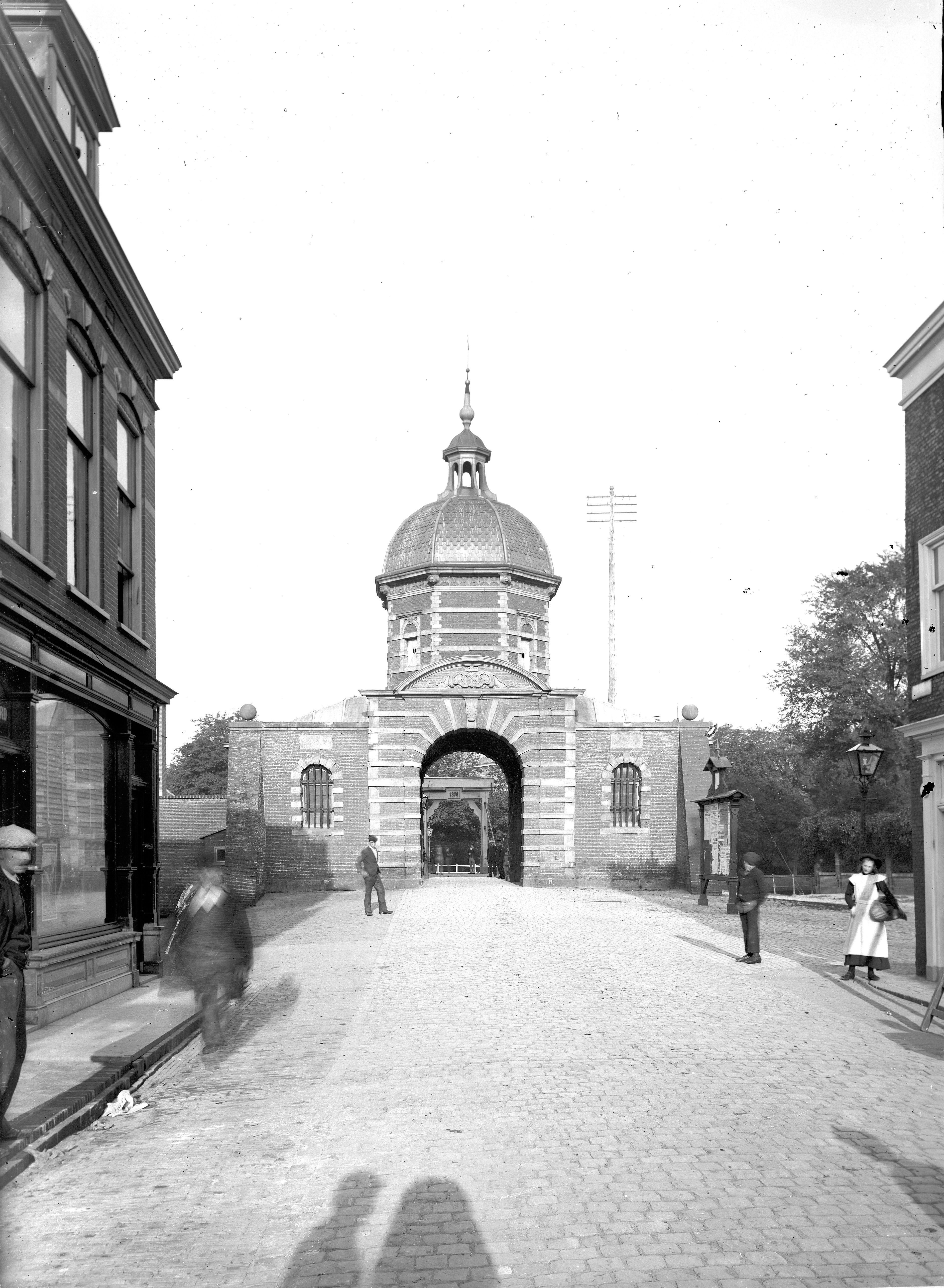 De Morspoort gezien vanuit de Morsstraat, de schaduw van de fotograaf op de voorgrond.